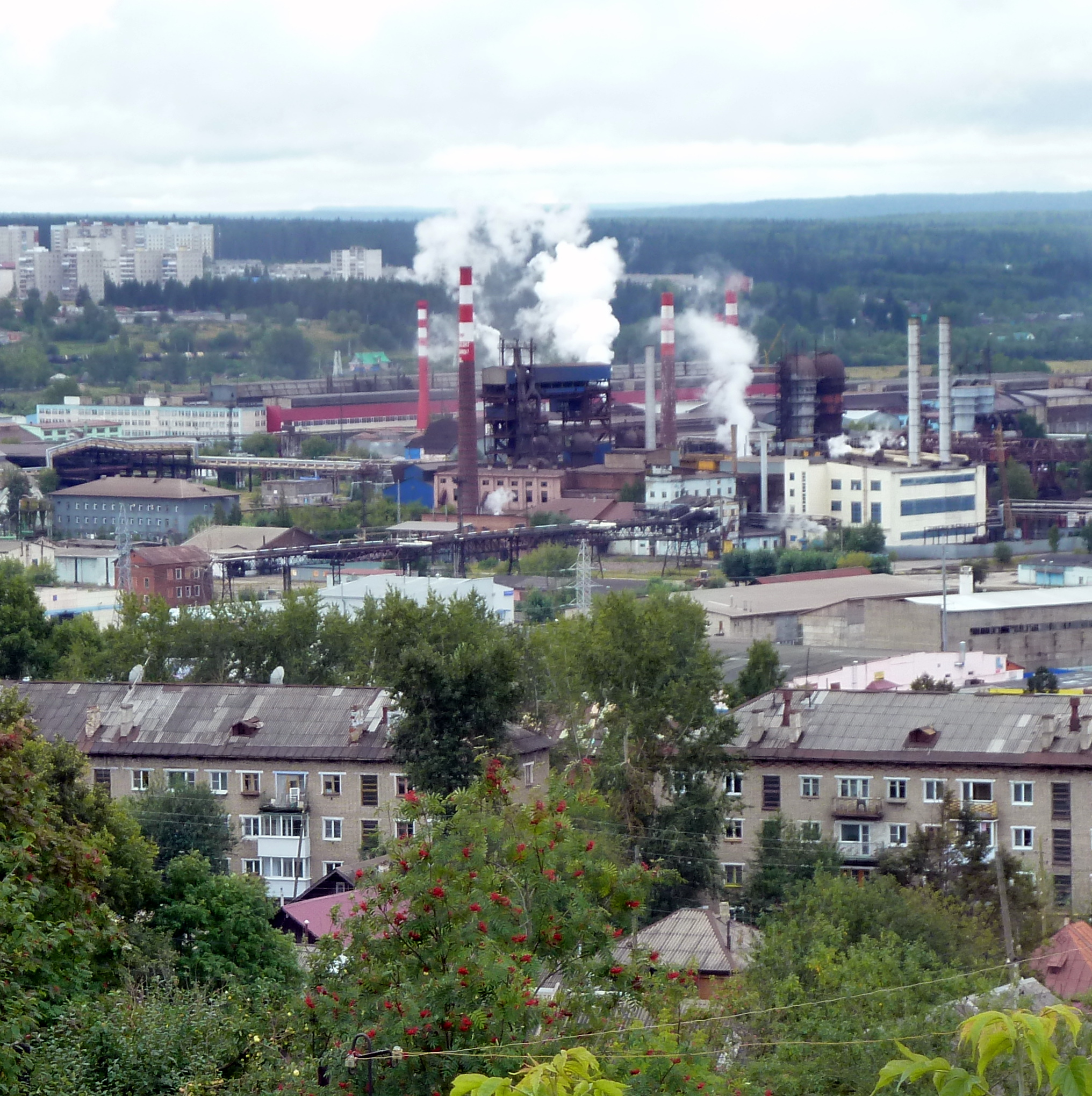 Чусовой